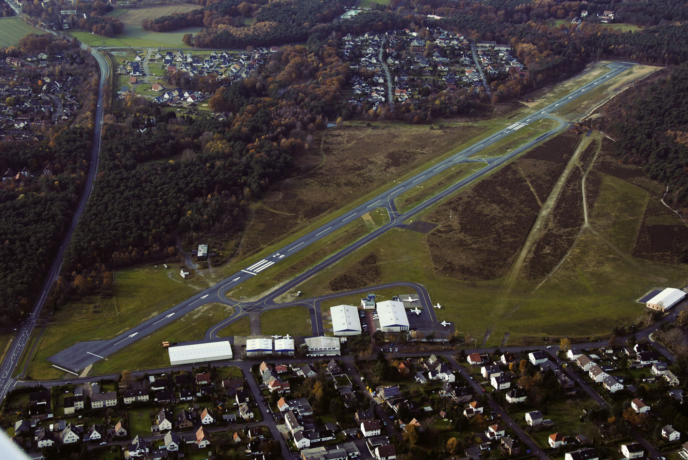 Luftaufnahme Flugplatz Bielefeld